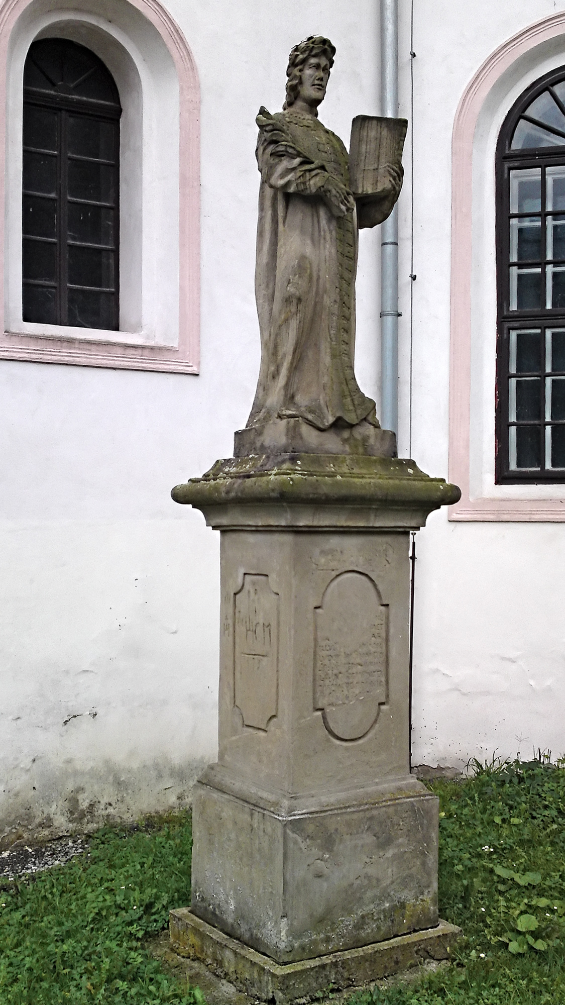 Socha sv. Donáta (Mojžíř), u kněžiště kostela, Mojžíř